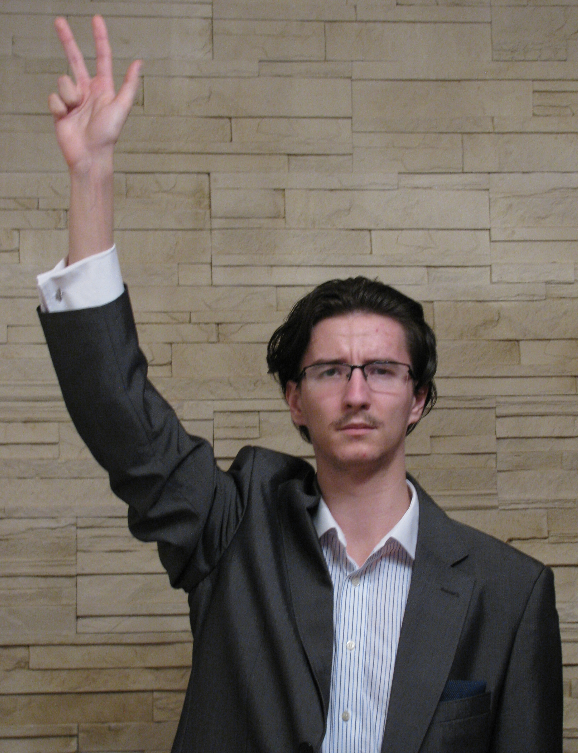 Próba rzutu za 3 punkty